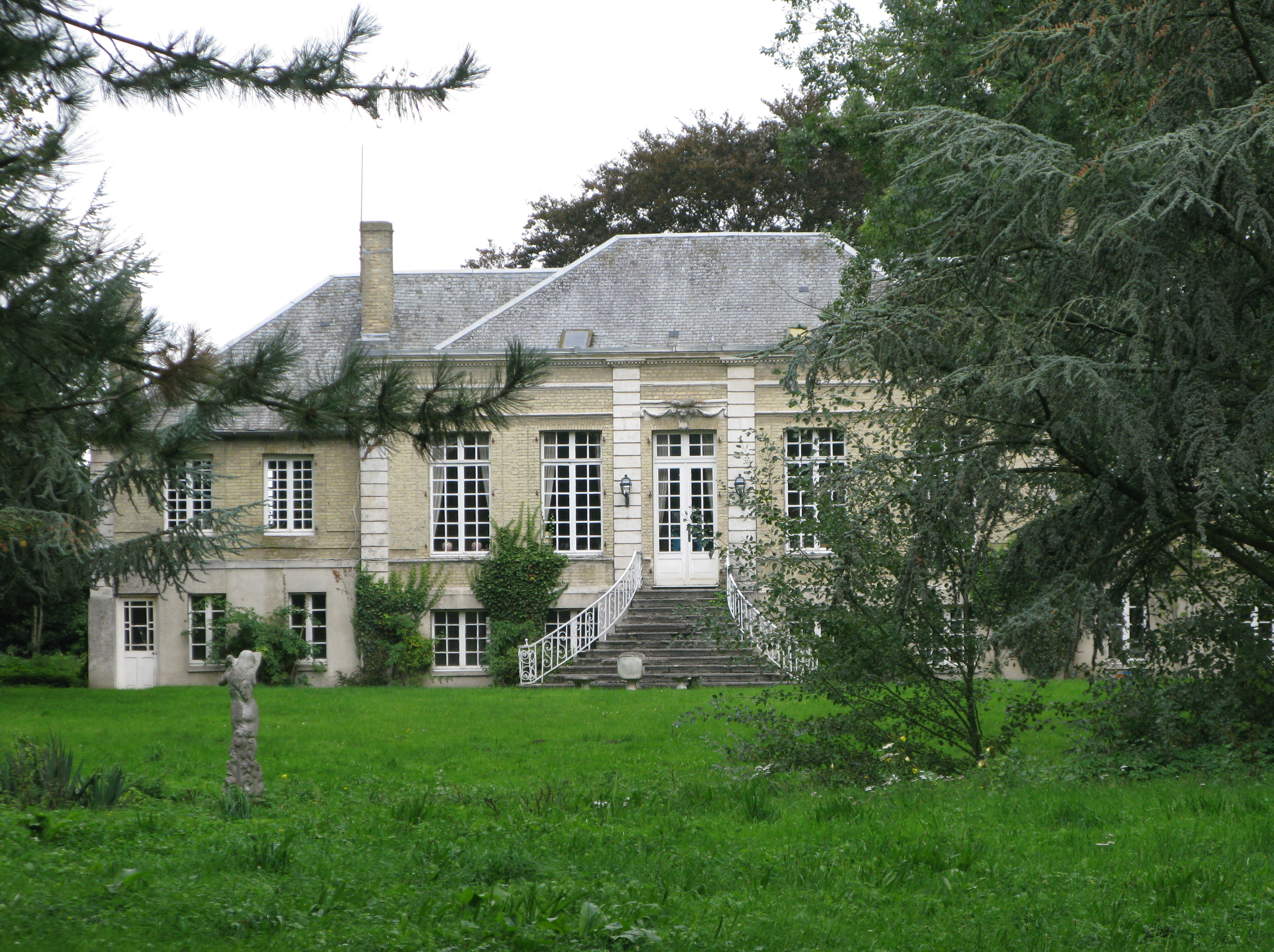 Château de l'Afgand à Spycker, près de Brouckerque.